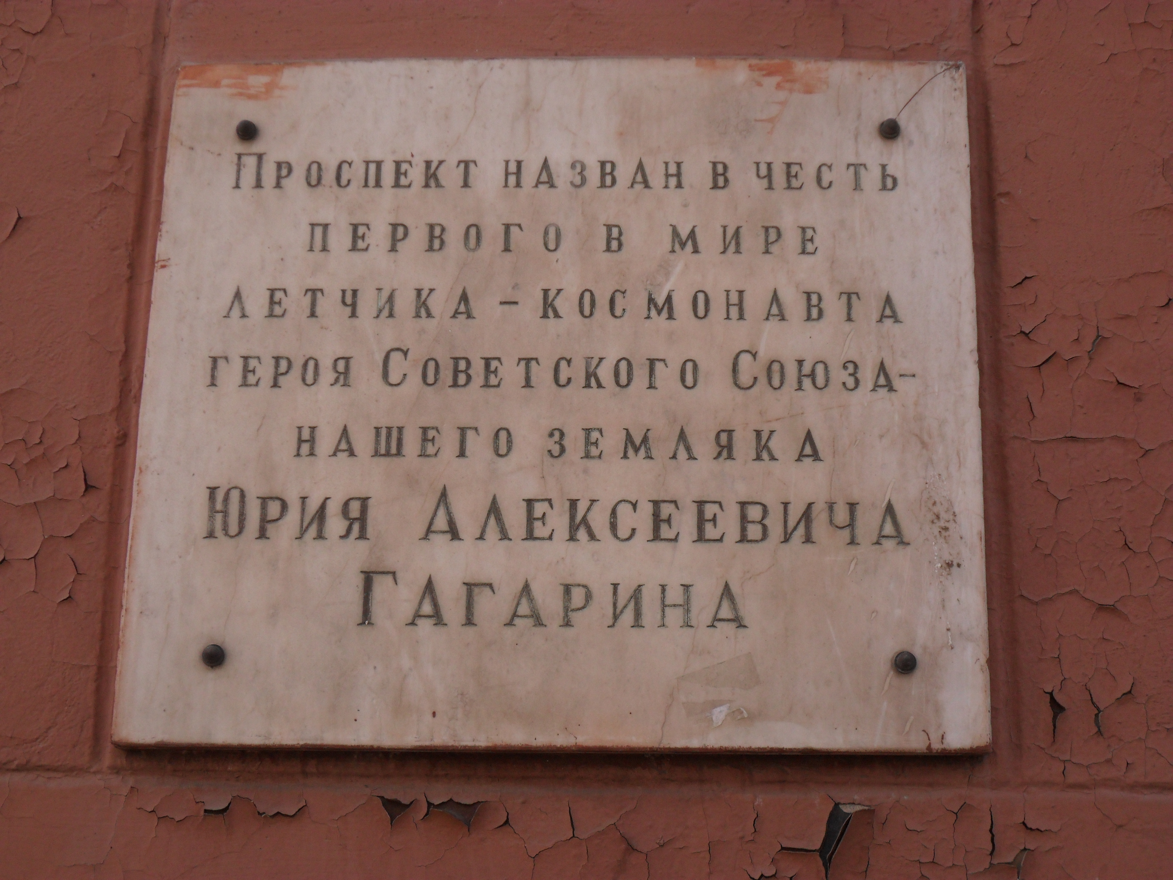 Аннотационная доска Юрию Гагарину на проспекте Гагарина в Смоленске.